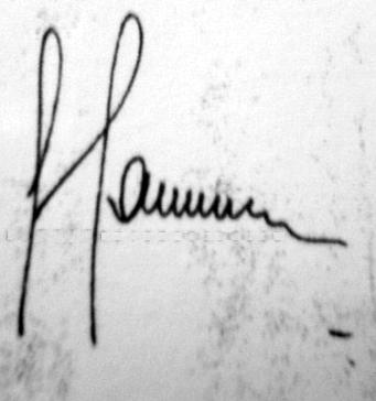 Firma de Leopoldo Fortunato Galtieri.